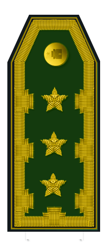 Será de terciopelo color verde alemán de 13 cm. de largo por 6 cm. de ancho, terminada en forma de trapecio e irá colocada sobre una base de tercio pelo verde boldo. Sobre la pala, llevará un ribete perimetral almenado de 1 cm. de espesor bordado en hilo metálico de color dorado. En el perímetro exterior de la pala, llevará un cordón de 2 mm. de espesor, del mismo color y sobre ella irá el grado representado por tres estrellas.